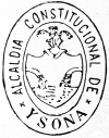 Escut antic d'Isona (Isona i Conca Dellà, Pallars Jussà)